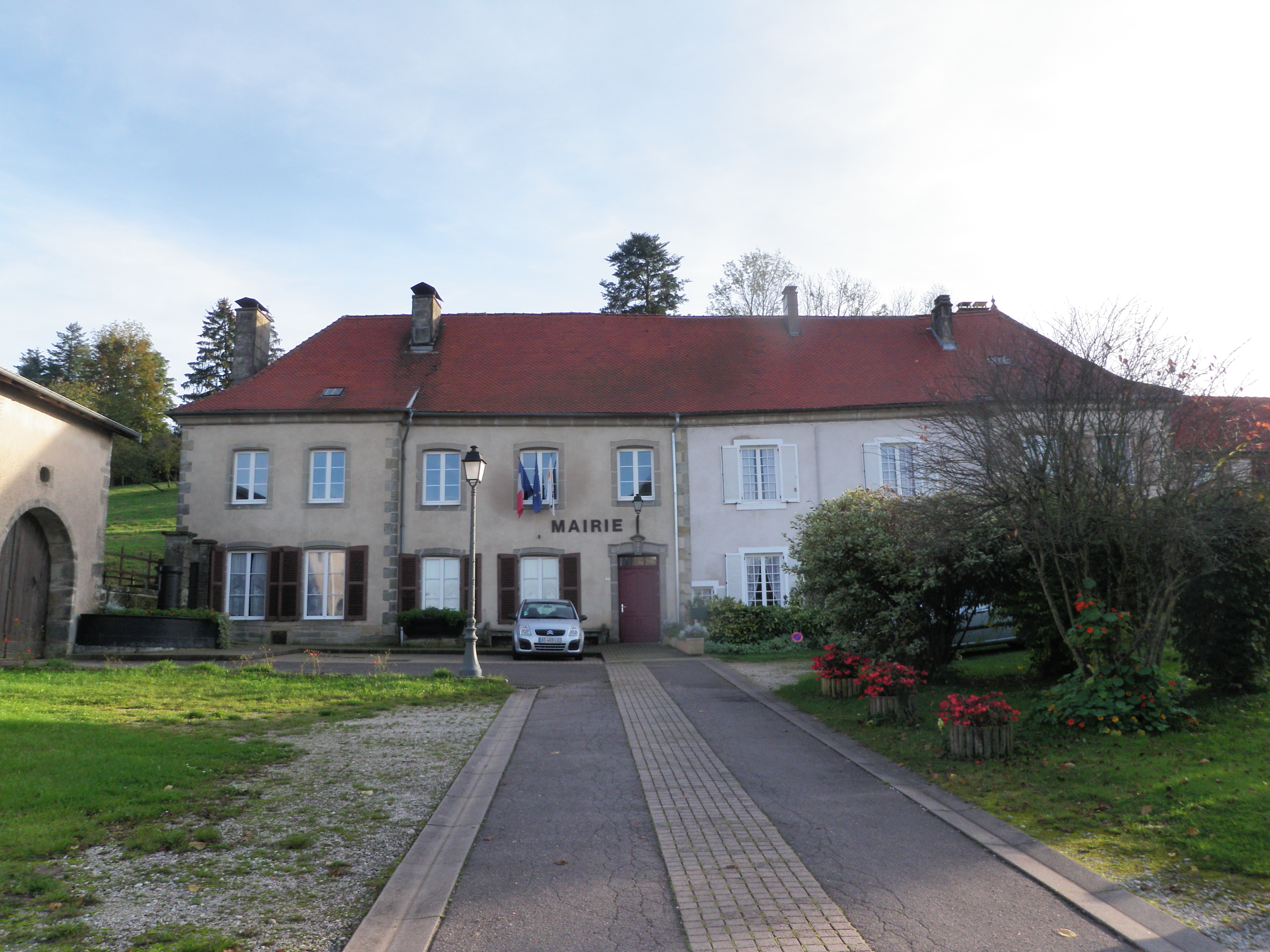 Château de Tollaincourt (façade principale au nord)